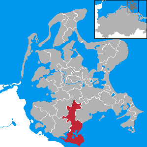 Garz/Rügen, Landkreis Rügen, Mecklenburg-Vorpommern